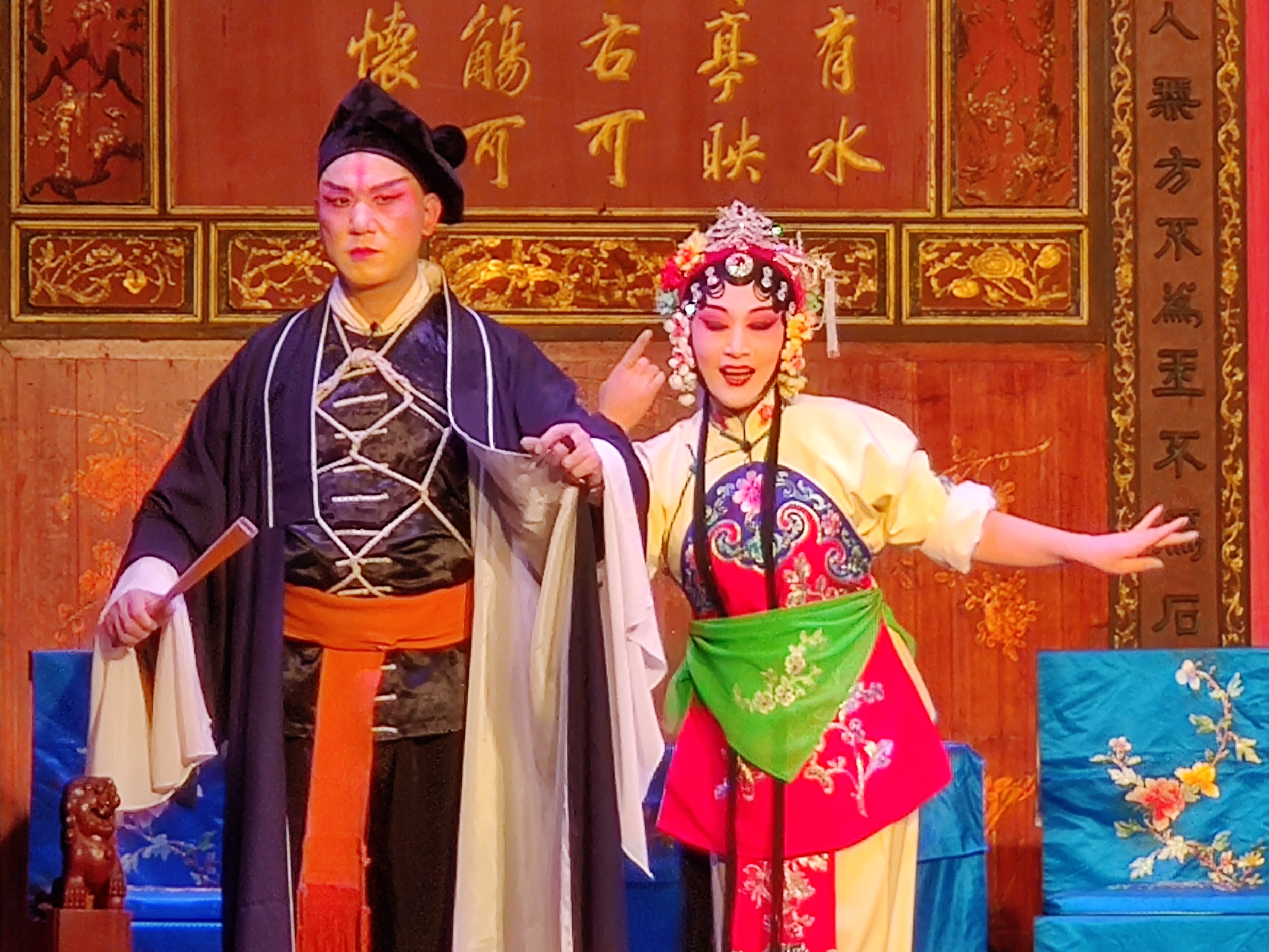 中文（中国大陆）: 潘金莲要武松揉眼睛。武松——徐建军